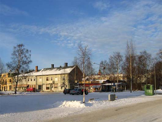 Mitt i Ljusdal